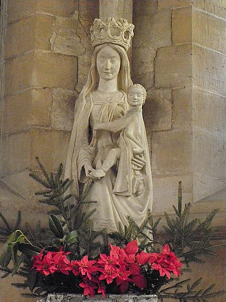 Vierge à l'Enfant, dite Vierge au lait de l'église Notre-Dame-de-la-Nativité de Villeneuve-le-Comte (77). Localisation: absidiole sud de l'église. Datation: XIVe. Description: Vierge à l'Enfant. Classement: 5 décembre 1905.